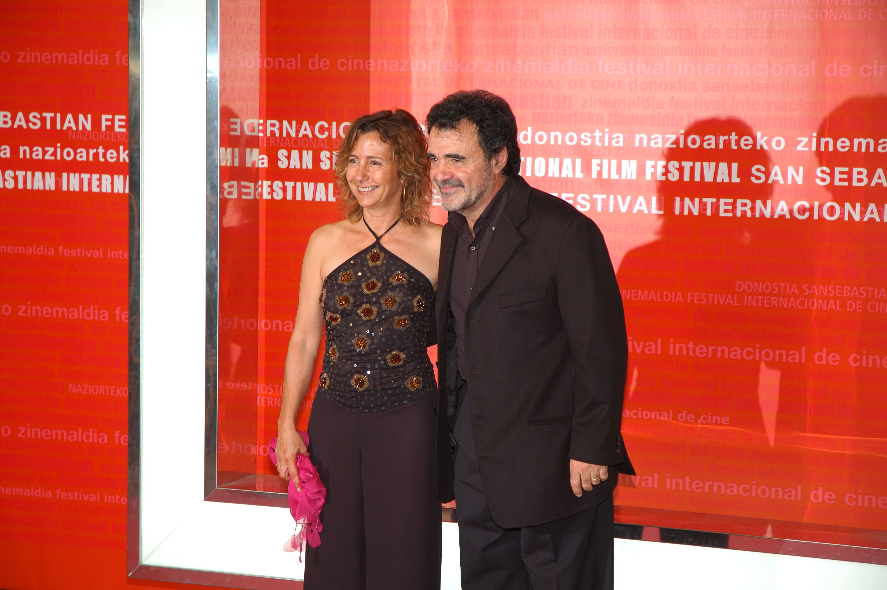 El director de cine argentino Carlos Sorín en el Festival Internacional de Cine de San Sebastián 2006